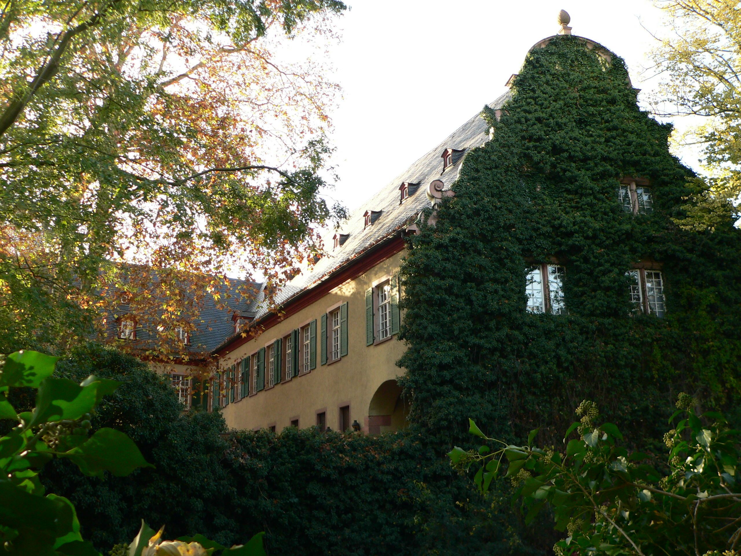 Südostseite des Neuen Schlosses Frankfurt-Höchst vom Burggraben aus gesehen